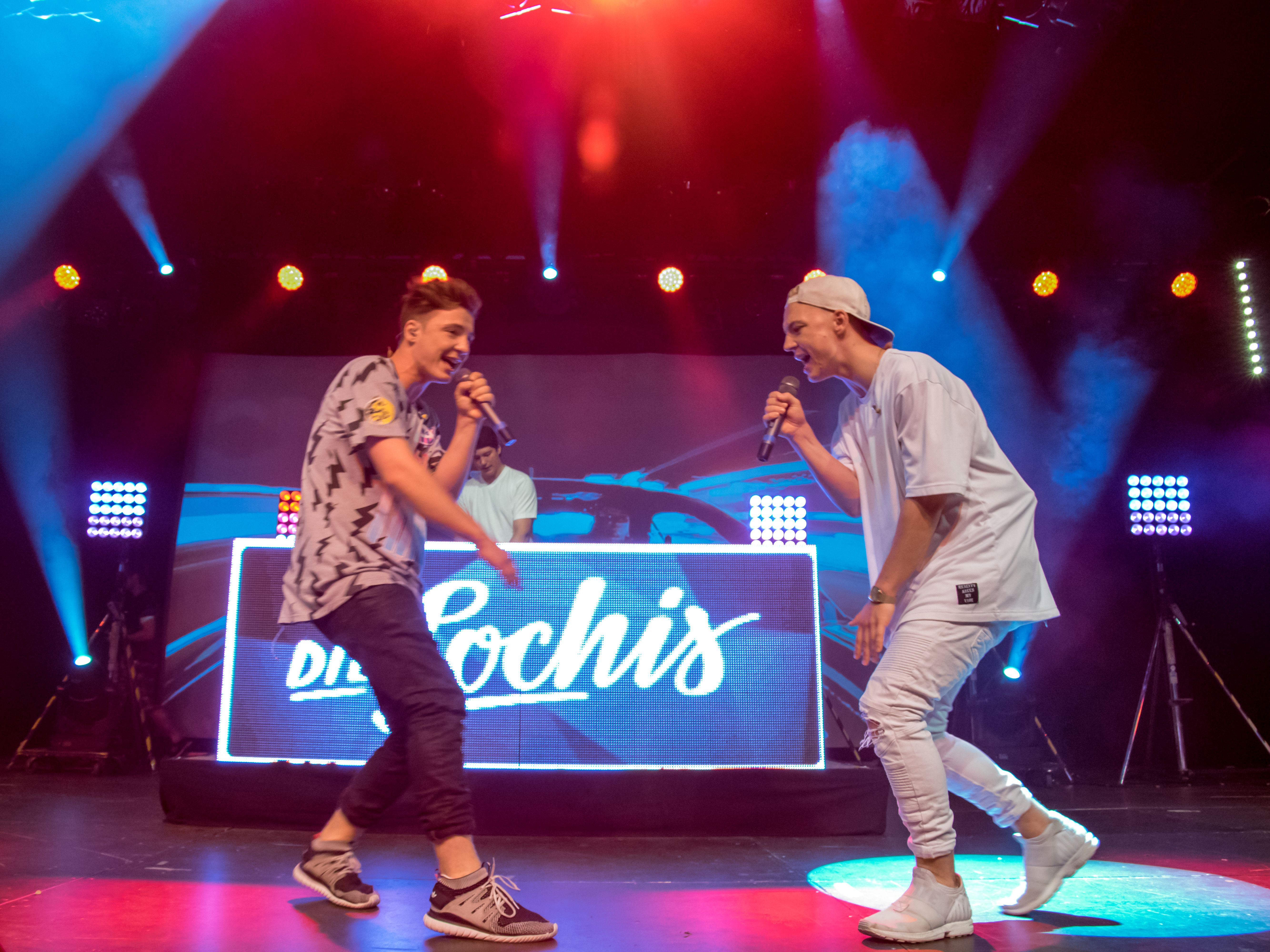 Bilder vom Zelt Musik Festival 2016 in Freiburg im Breisgau Die Lochis